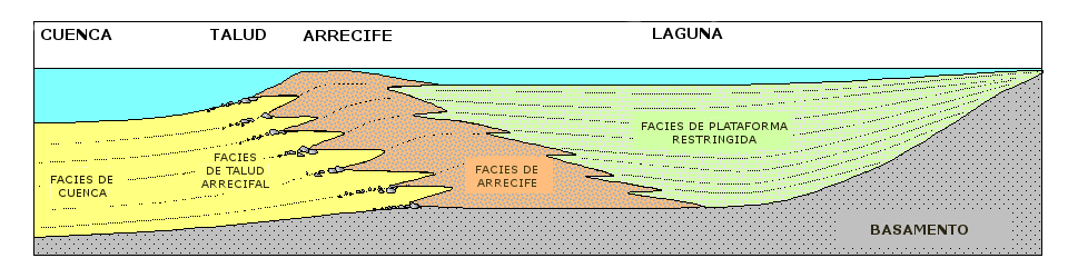 Sección geológica general de una plataforma carbonatada.